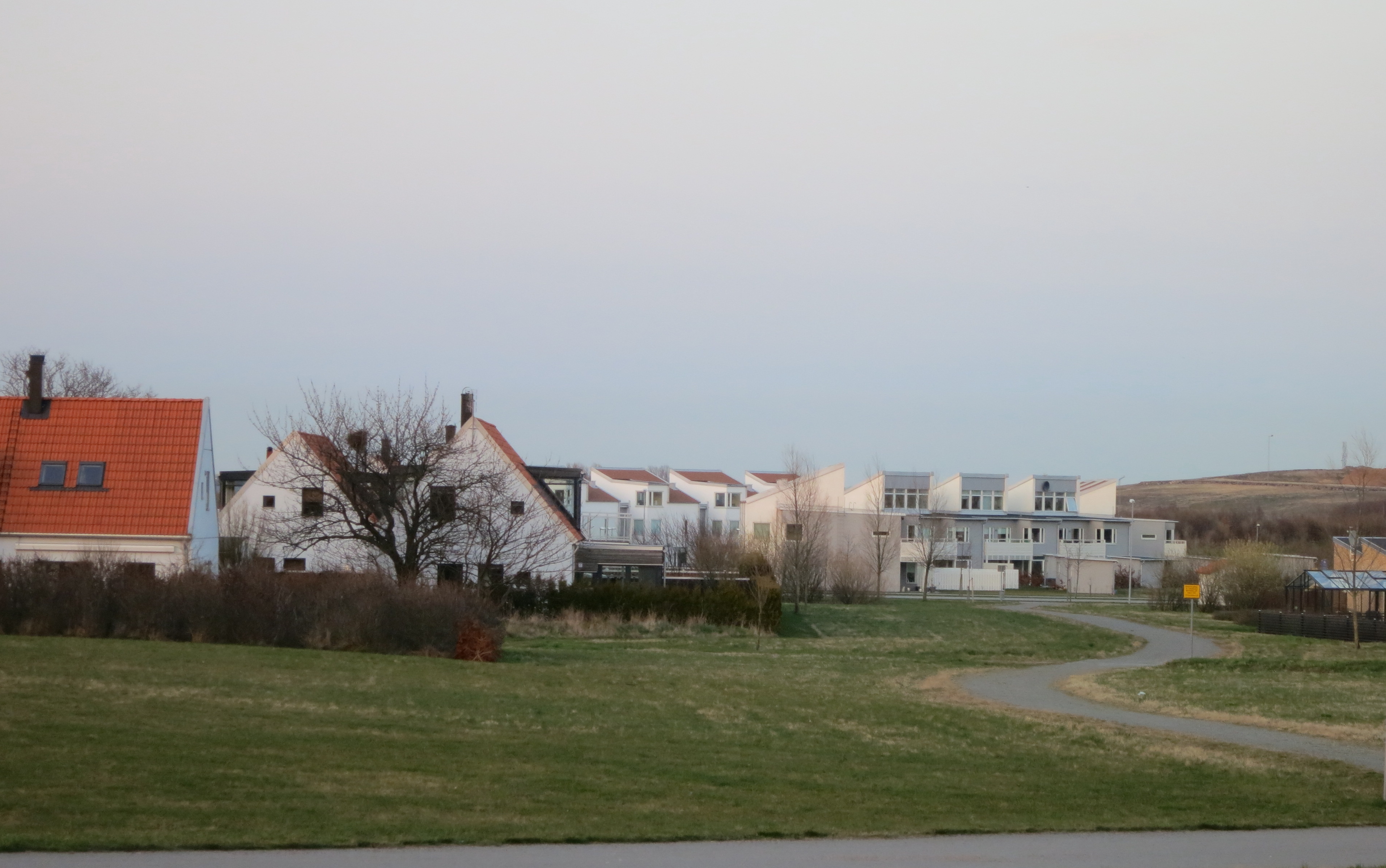 Kurland, Stavstensudde